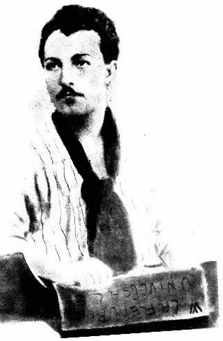 Imagem do Anarquista Giovanni_Passannante desenhada por Morato Rubbini